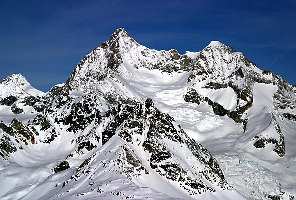 Arbenhorn, Ob. Gabelhorn (4063 m.ü.M.) und Wellenkuppe, Schweiz